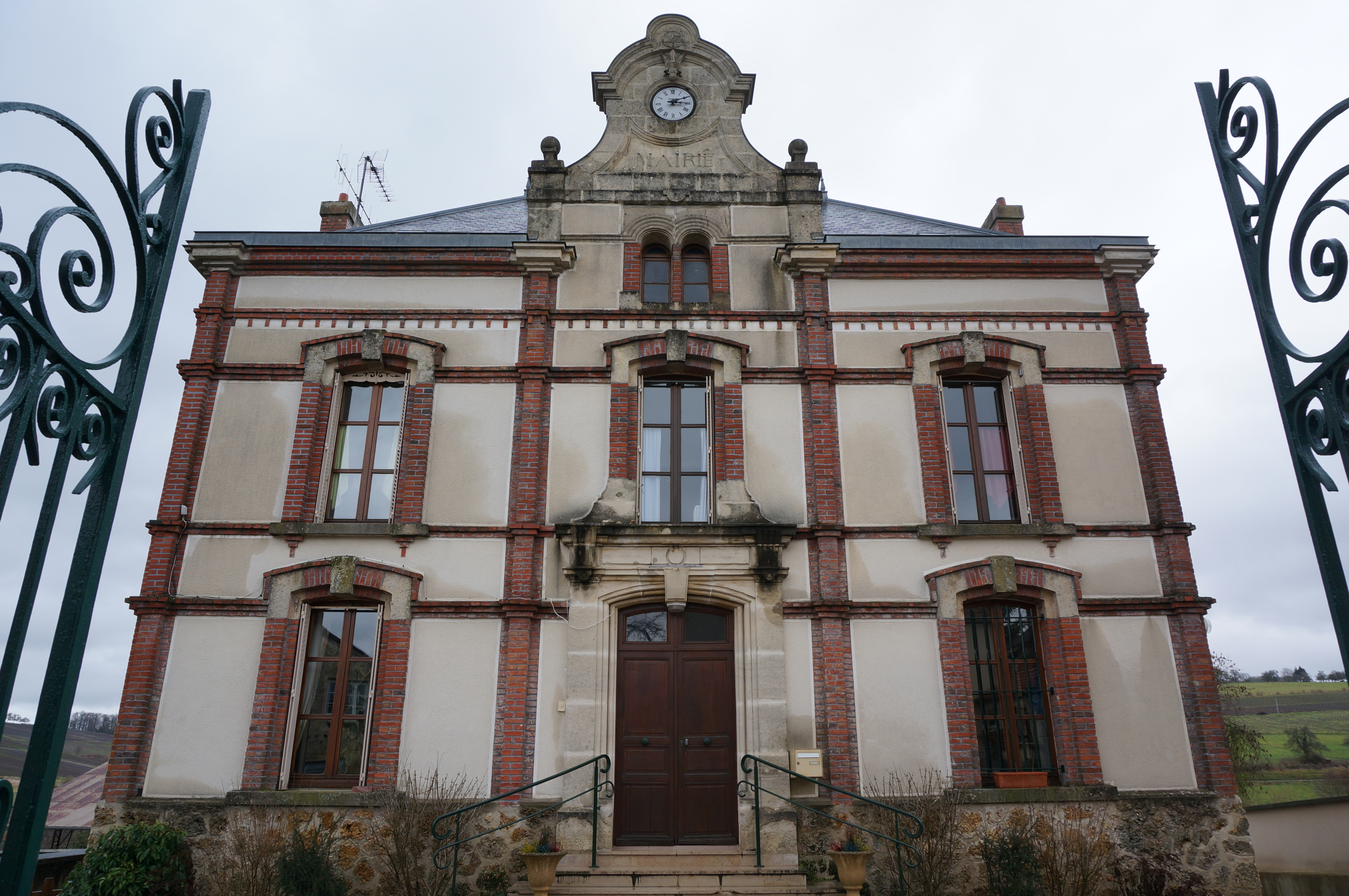 Vue du village.